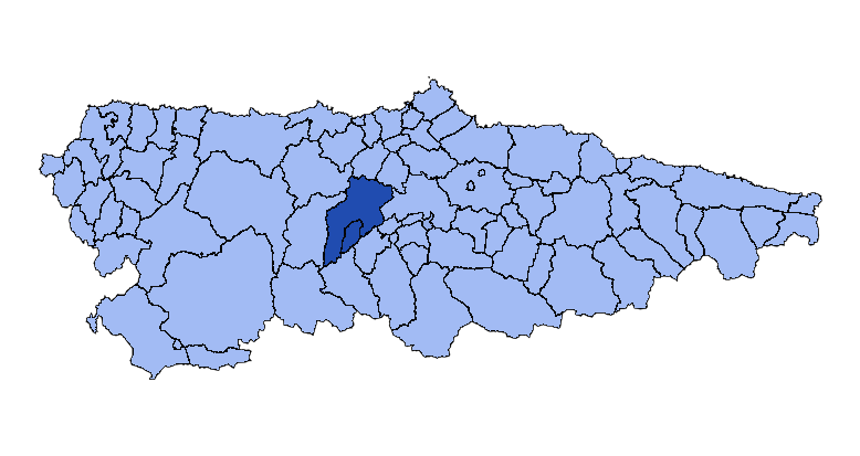 Concejos que forman la mancomunidad asturiana de los Concejos de Grado y Yernes y Tameza